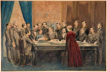 Assinatura do projeto de Constituição de 1891, Aquarela sobre papel, 31x46 cm.